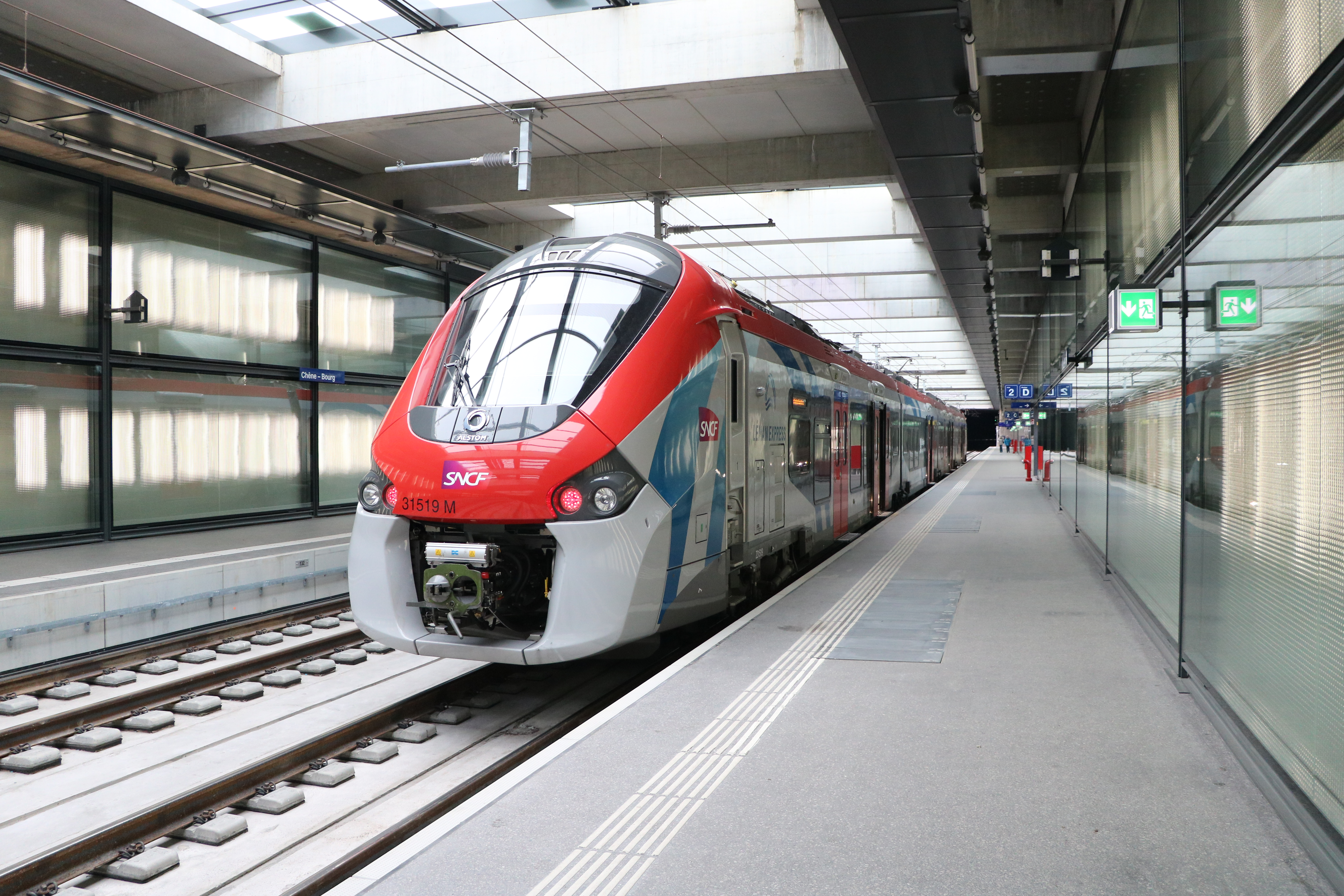 Regiolis Léman Express 31519 im Bhf Chêne-Bourg, Fahrtrichtung Genf.